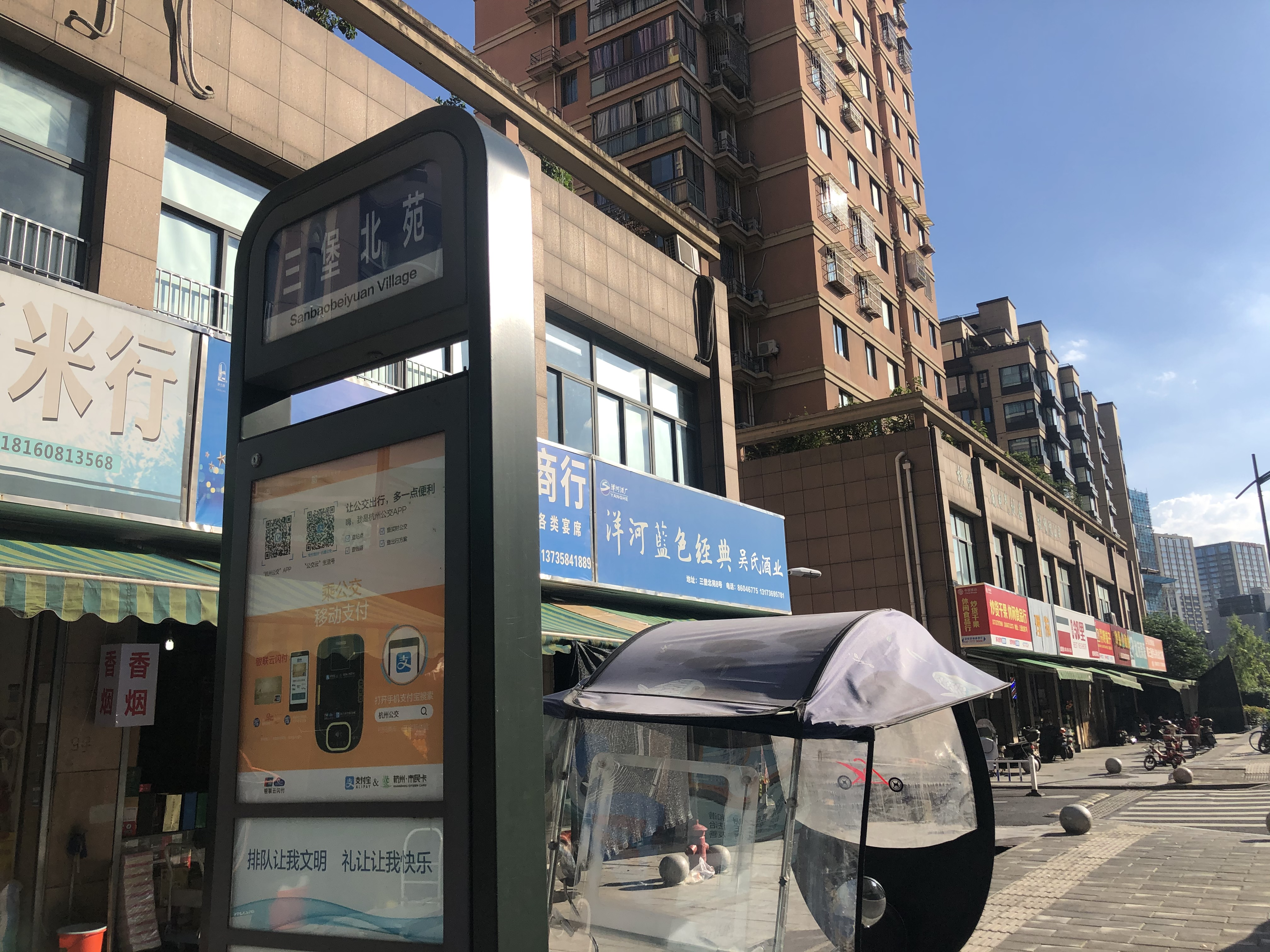 杭州江干区三堡北苑